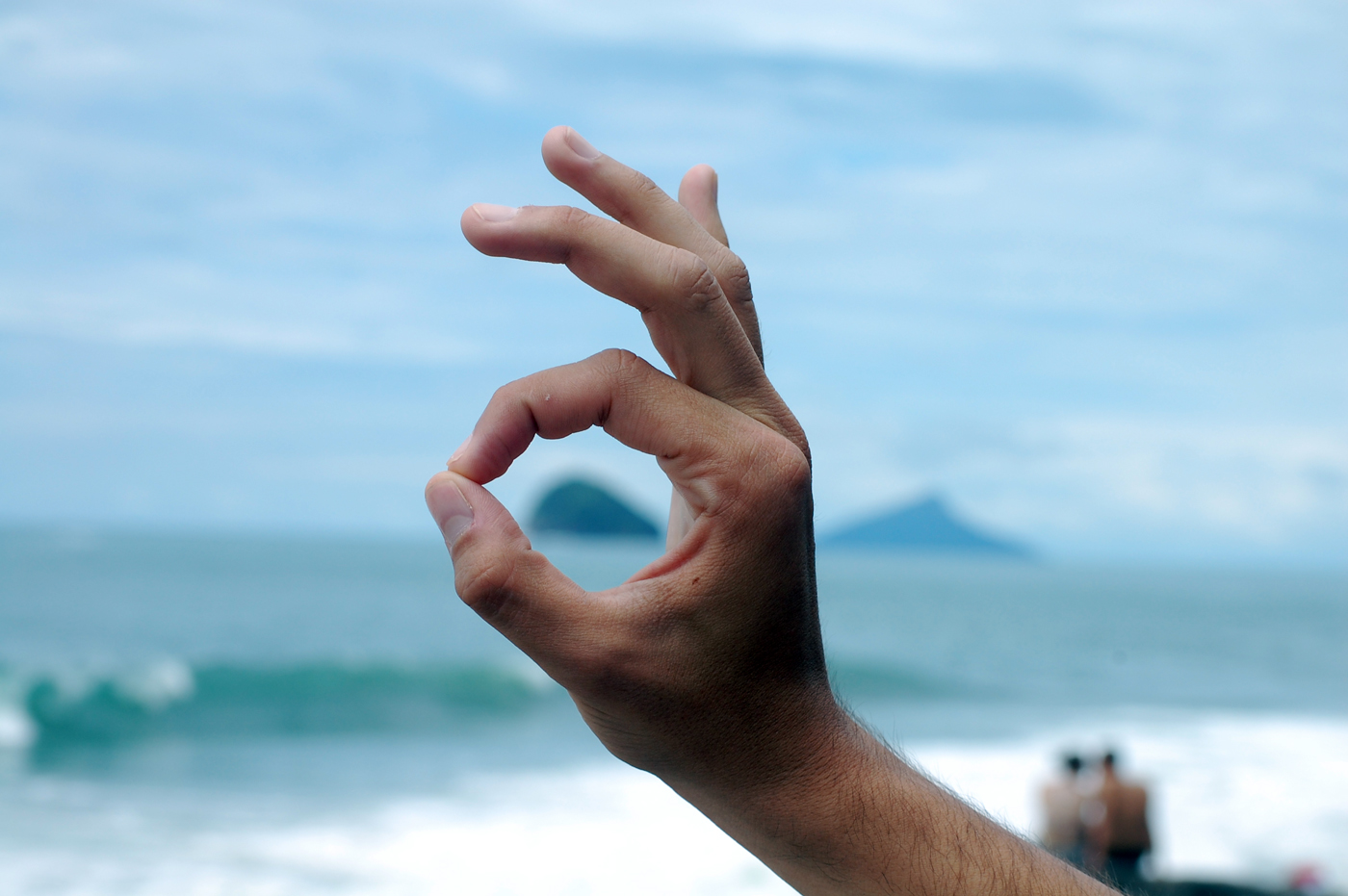 ok